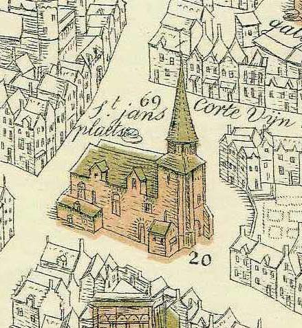 Sint-Janskerk - Brugge - West-Vlaanderen - Belgium